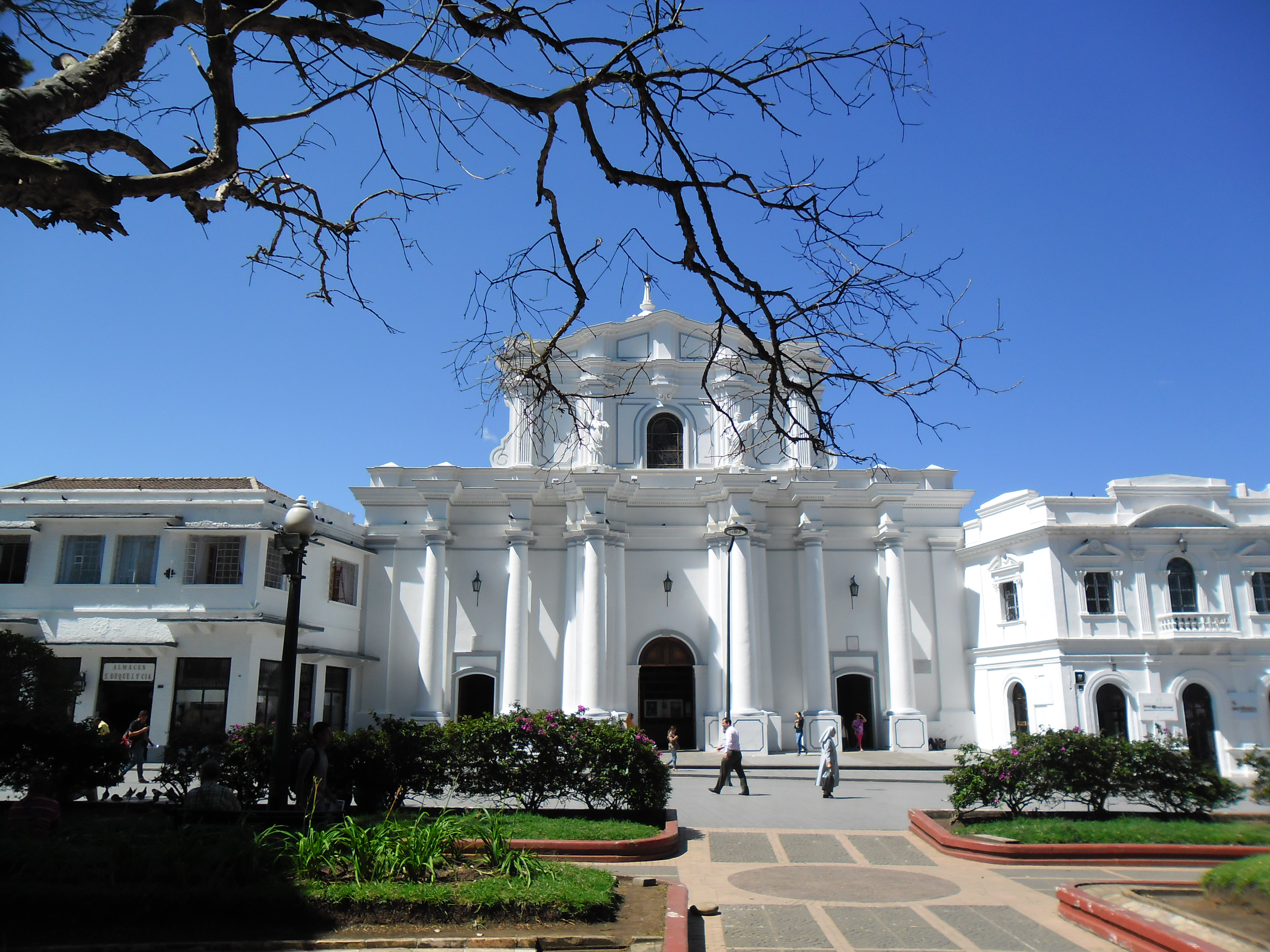 Es uno de los templos católicos mas representativos de la ciudad de Popayán, capital del departamento del Cauca; situada en el parque caldas en pleno centro histórico, reparado luego de sufrir averías por el terremoto de 1983. cabe anotar que es una magna obra arquitectónica que resalta el estilo colonial de la ciudad blanca de Colombia.